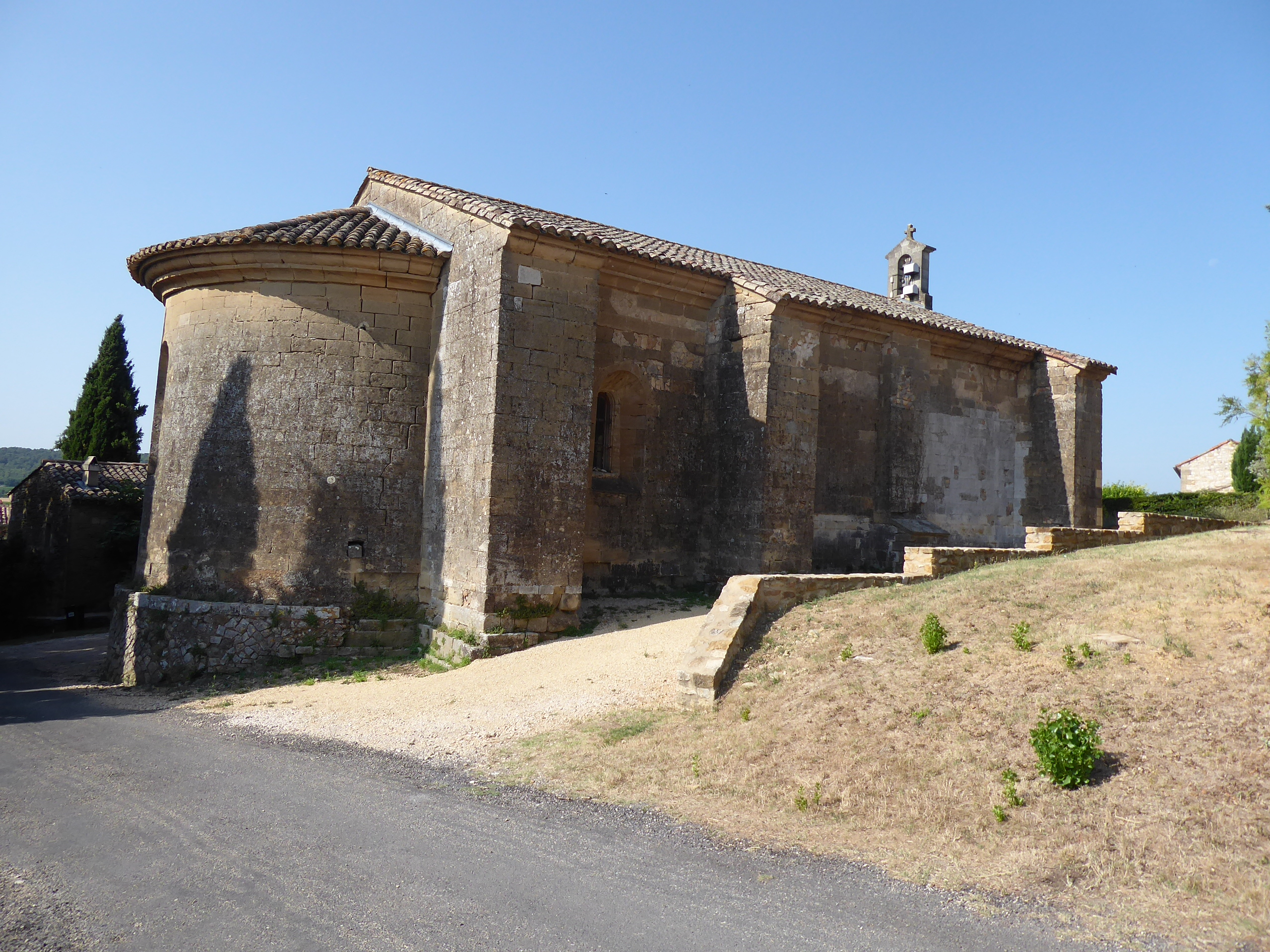 Église Saint-Martin de Serviers-et-Labaume